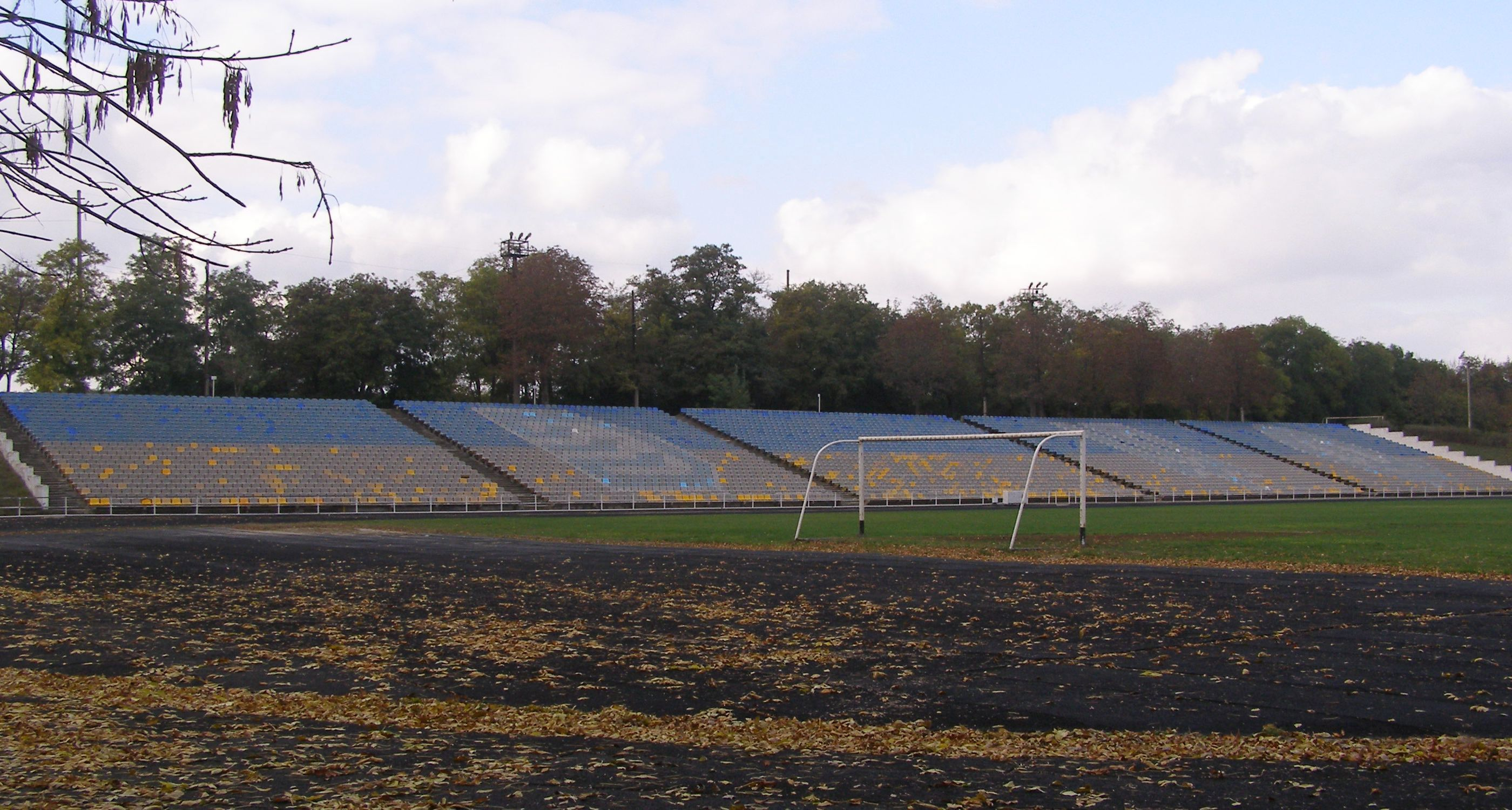 Zentralstadion der Ukrainischen Donauschiffahrt in Ismajil